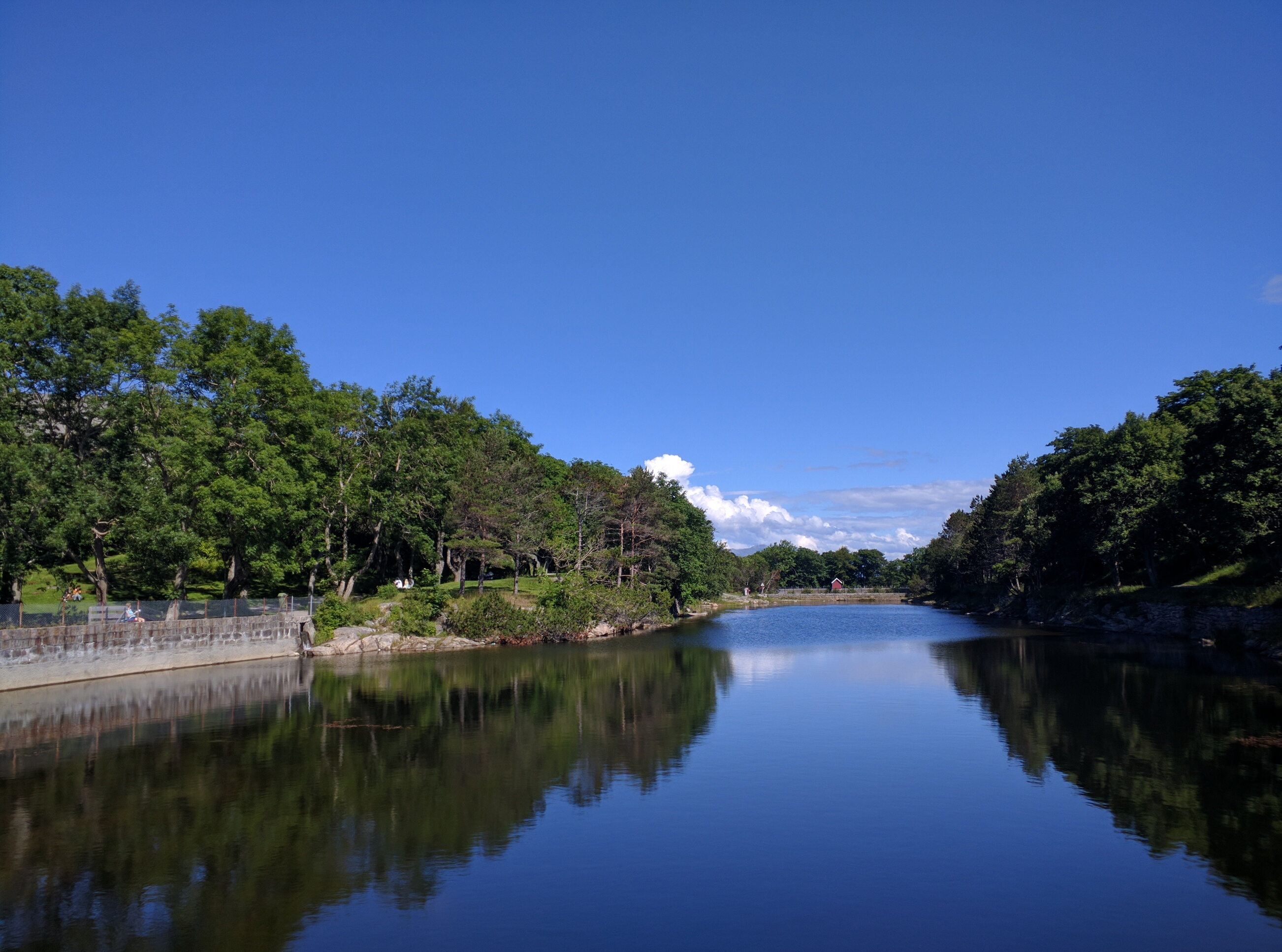 Vanndamman in Kristiansund, Norway.